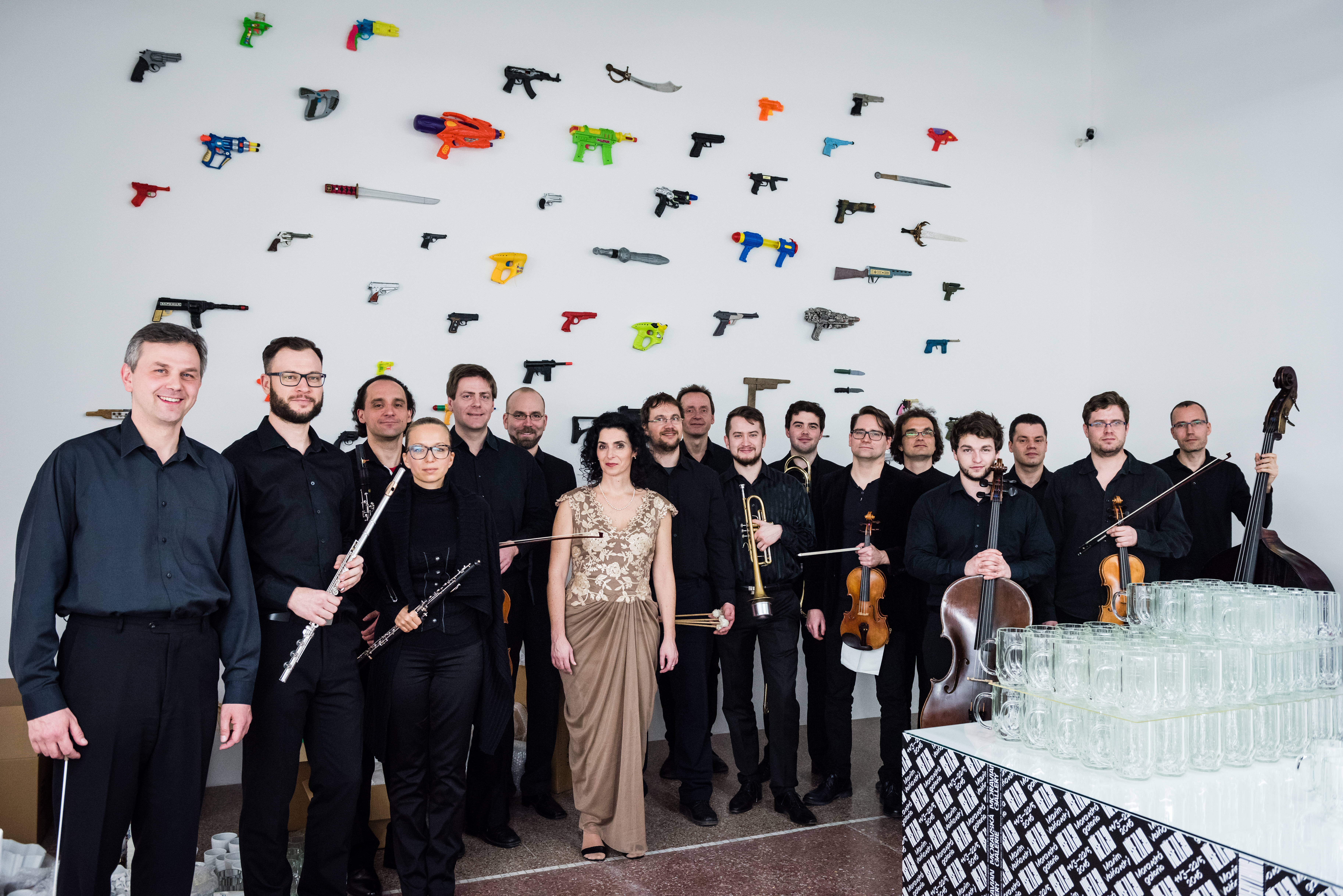 BCO-Moravska galerie.foto Jan Prokopius